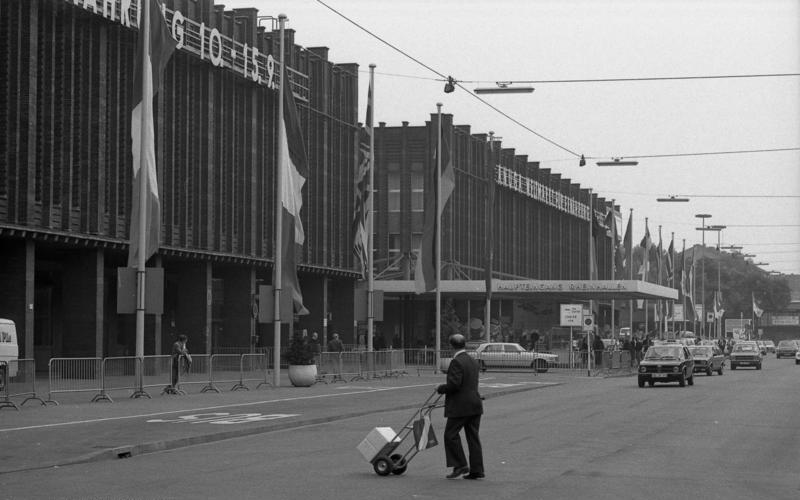 ANUGA 1977 in Köln (Allgemeine Nahrungs- und Genussmittel-Ausstellung)